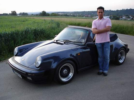 Porsche 911 WTL Cabrio Bj. 1985 (Werksturbolook). Die Fahrrzeuge Porsche 911 WTL wurden ab Werk gebaut, wie der 930 Turbo jedoch ohne den Turbo-Motor ( WTL - Werksturbolook bezieht such auf Turbo Sitze, Tacho, Bremsen, Fahrwerk)